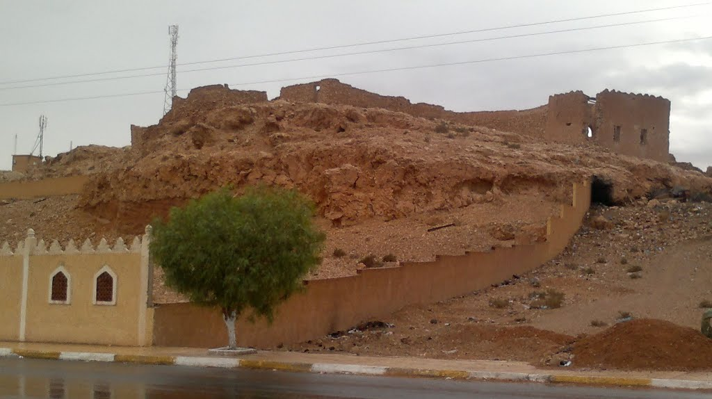 القصر العتيق لحمر